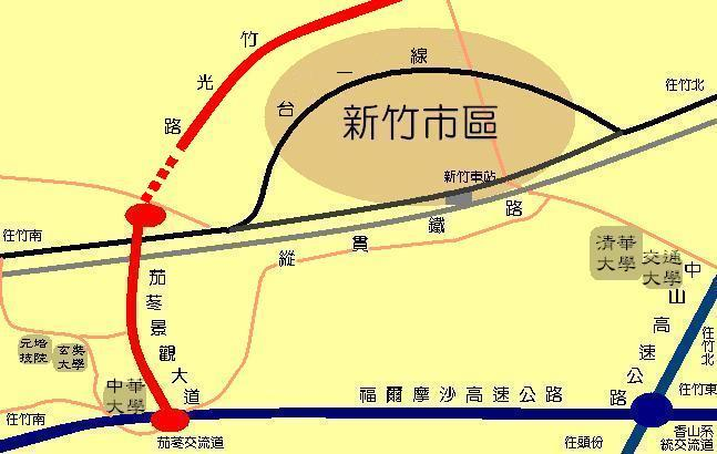 新竹市茄苳景觀大道與市區圖